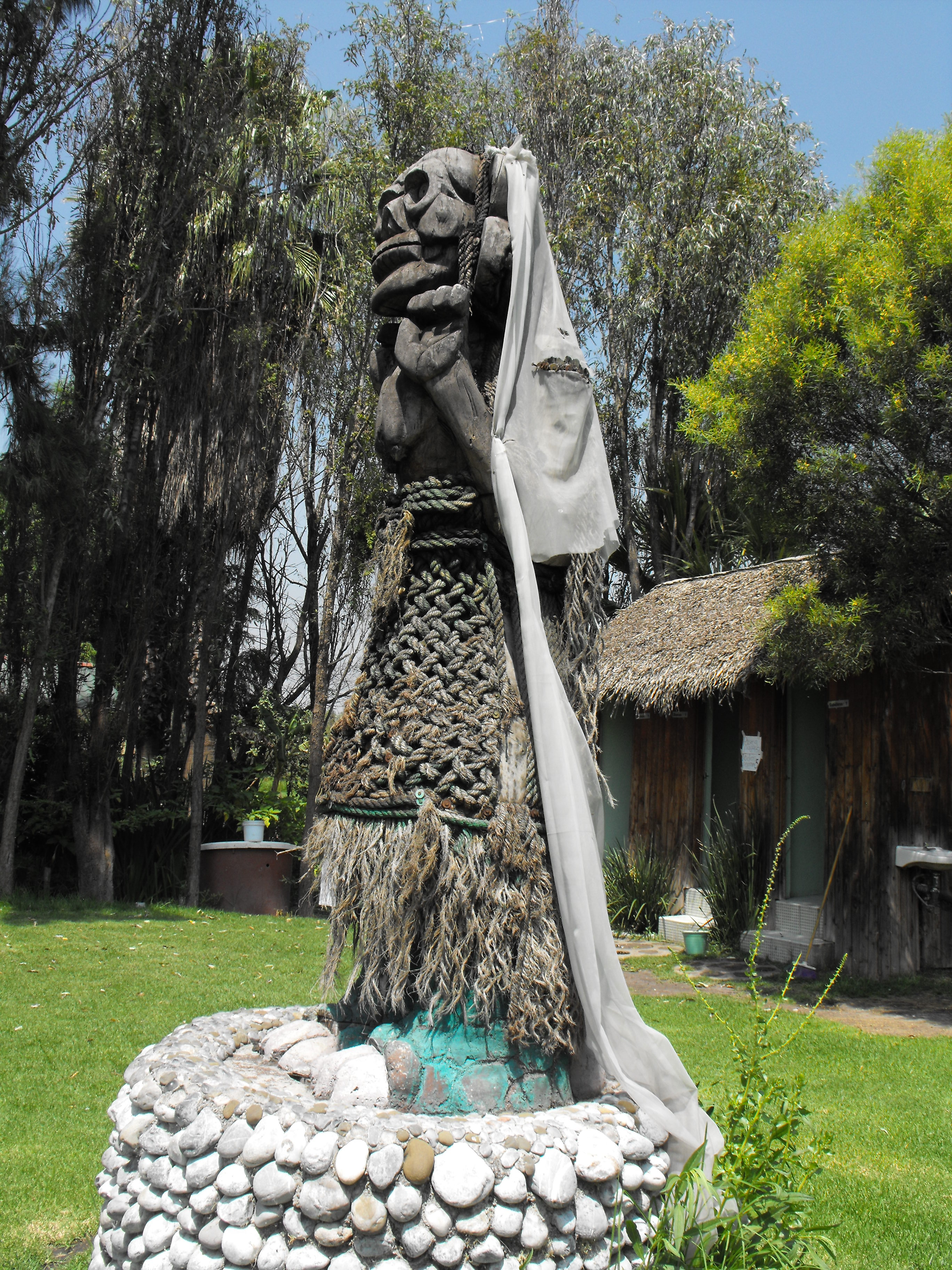 Madera tallada en forma de mujer llamada "La llorona", típica de la cultura mexicana, con un velo blanco sobre una base de piedra, ubicado en la isla de "la llorona" en los canales de Xochimilco, México. DF.